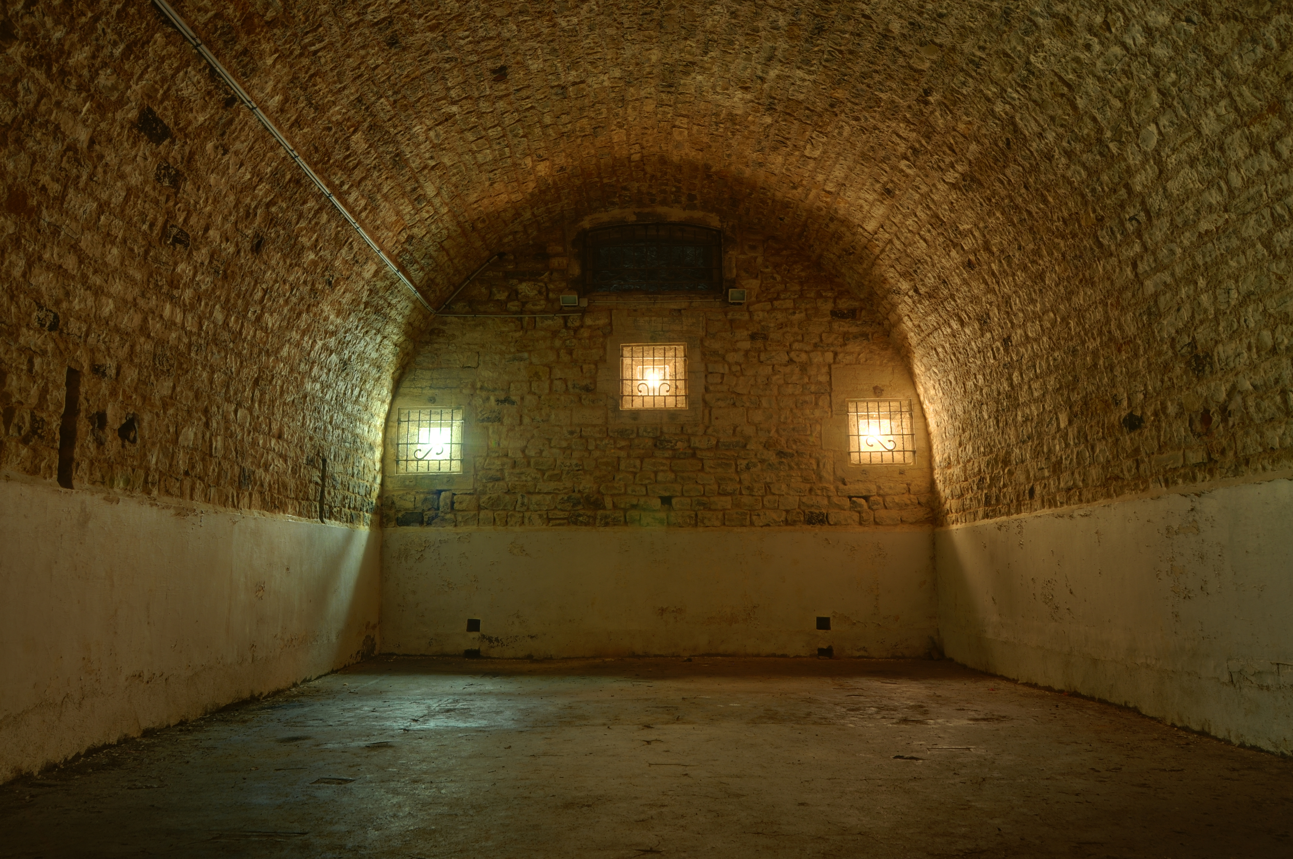 Un des deux magasins à poudre. Bart hill fortifications (HDR).